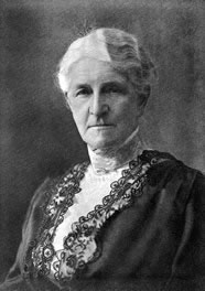 Portrait d'Emma Stämpfli-Studer